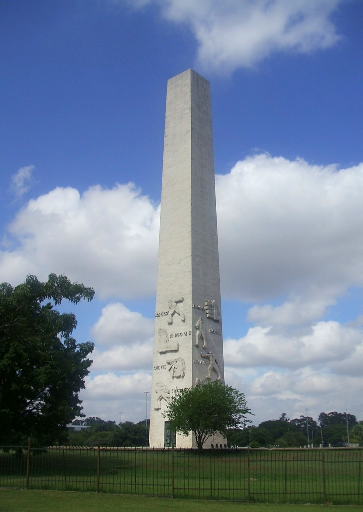 Obelisco de São Paulo, no Parque do Ibirapuera, São Paulo, Brasil.